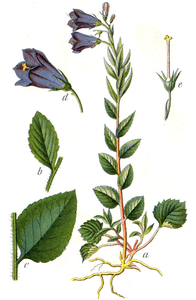 Campanula rhomboidalis L. Original Caption Rautenblätterige Glockenblume, Campanula rhomboidalis